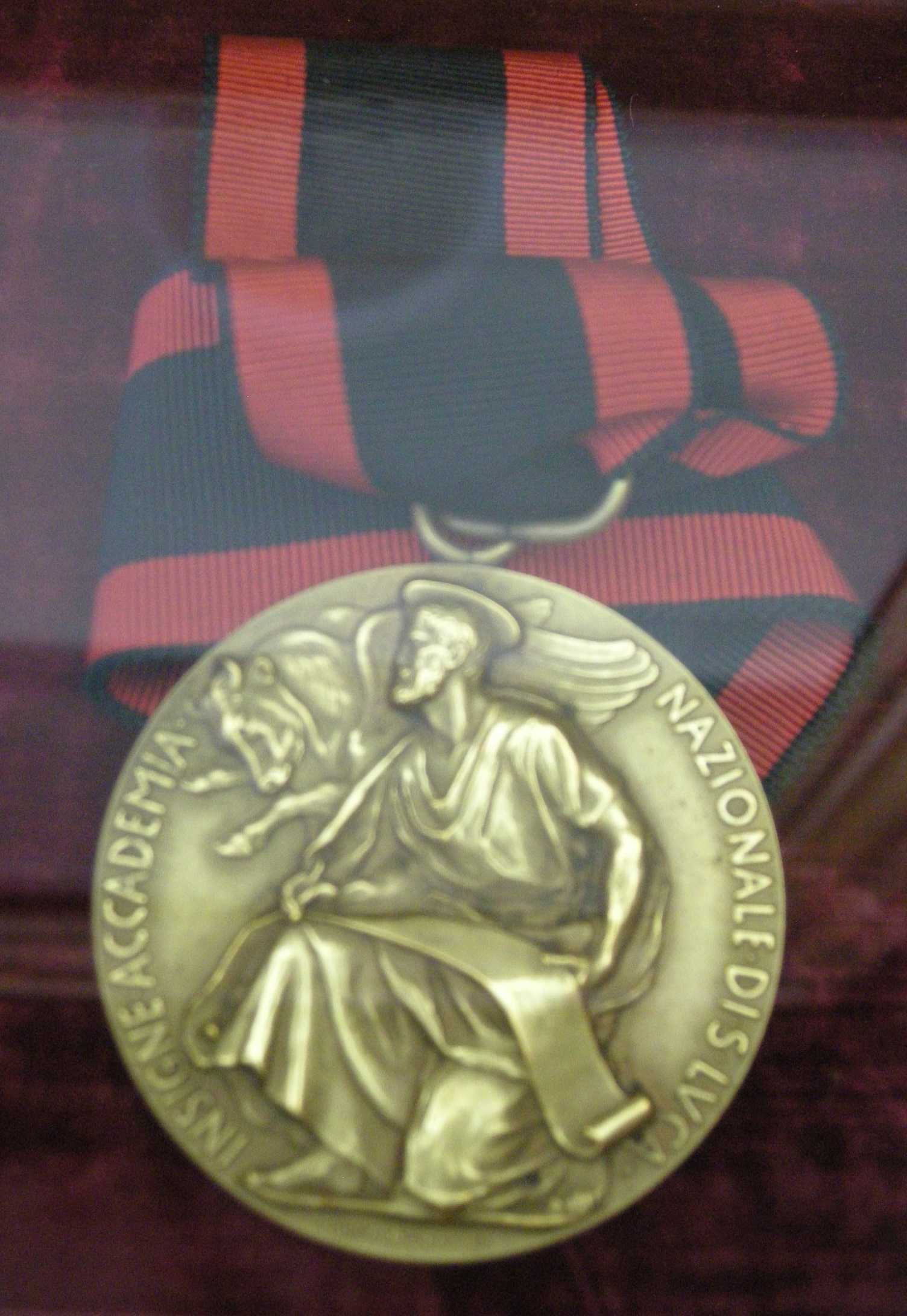 Casa siviero, studio-biblioteca, medaglia accademia nazionale di san luca